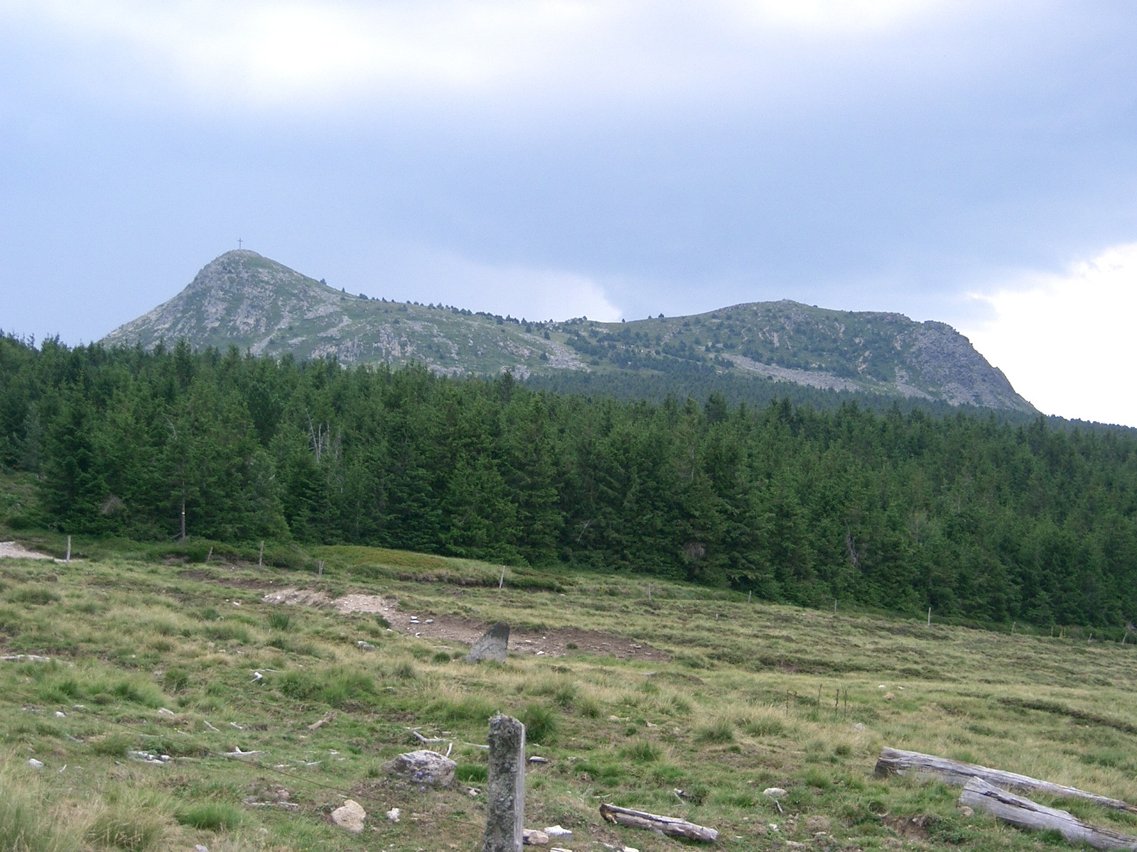 Mont Mézenc sommet sud : 1753 m / sommet nord :1749m, surmonté d'une croix. Massif Central - France self made PRA